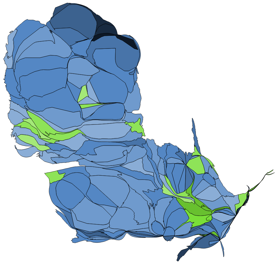 中文（台灣）: 顏色對照表 部分村里因共用投開票所 故圖中部分村里得票為依人口調整後資料